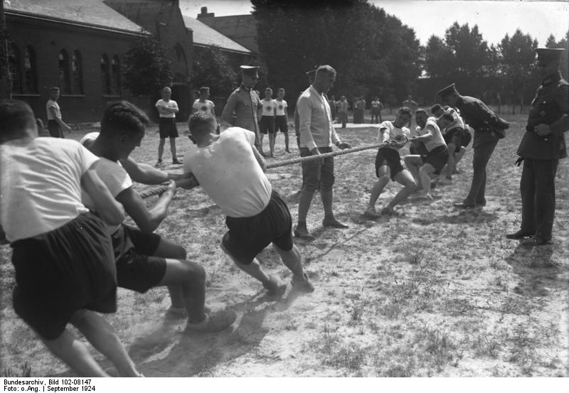 Einen Tag bei der modernsten Polizei Europas! Tauziehen von Polizeischülern in Brandenburg a/Havel.